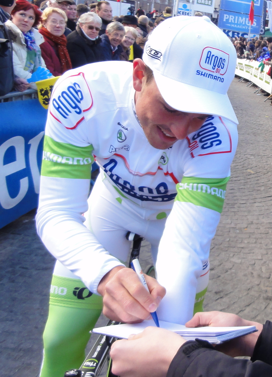 John Degenkolb deelt handtekeningen uit bij de start van de Ronde van Vlaanderen